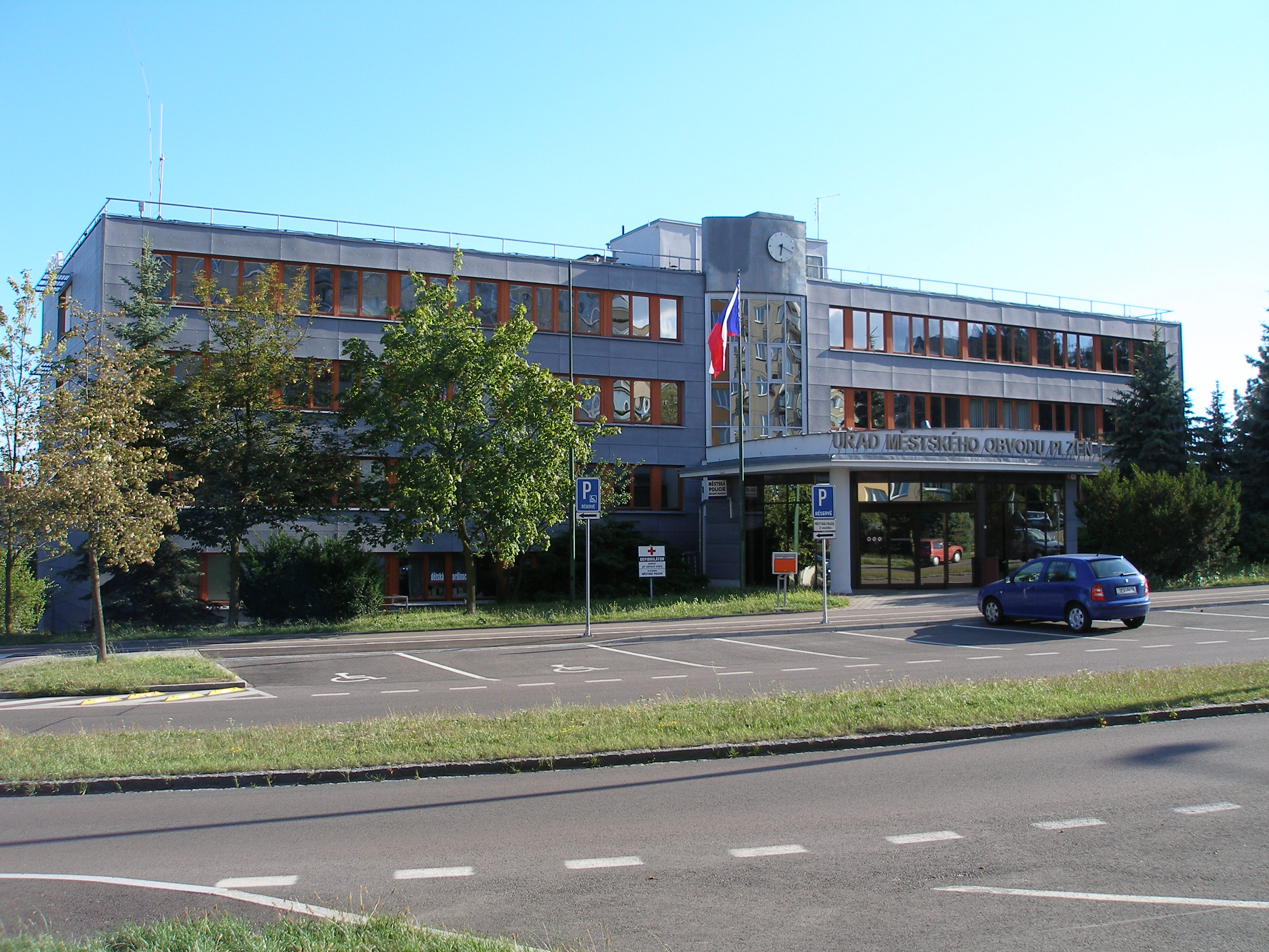 Úřad městského obvodu Plzeň 1